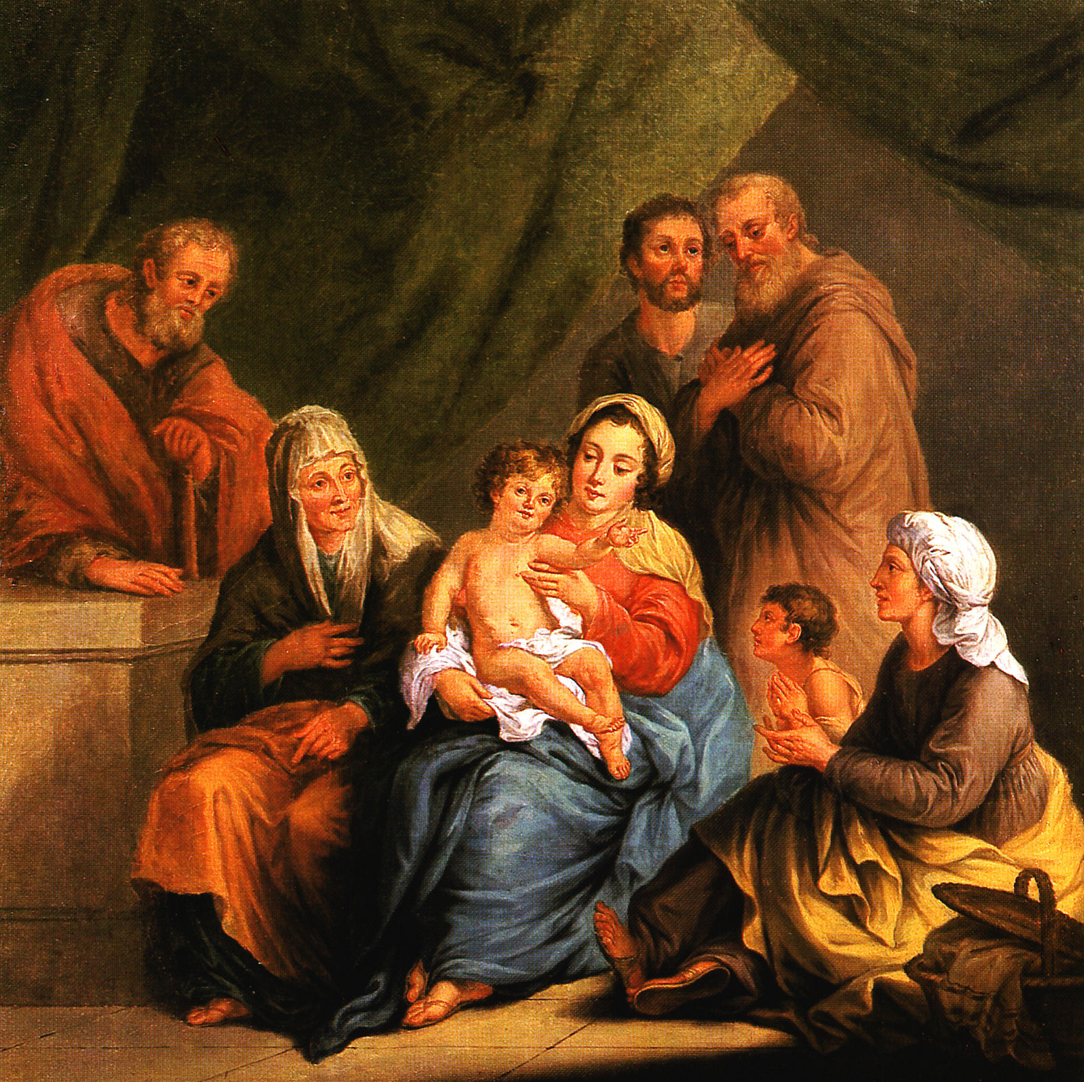 Donát János: Szent család